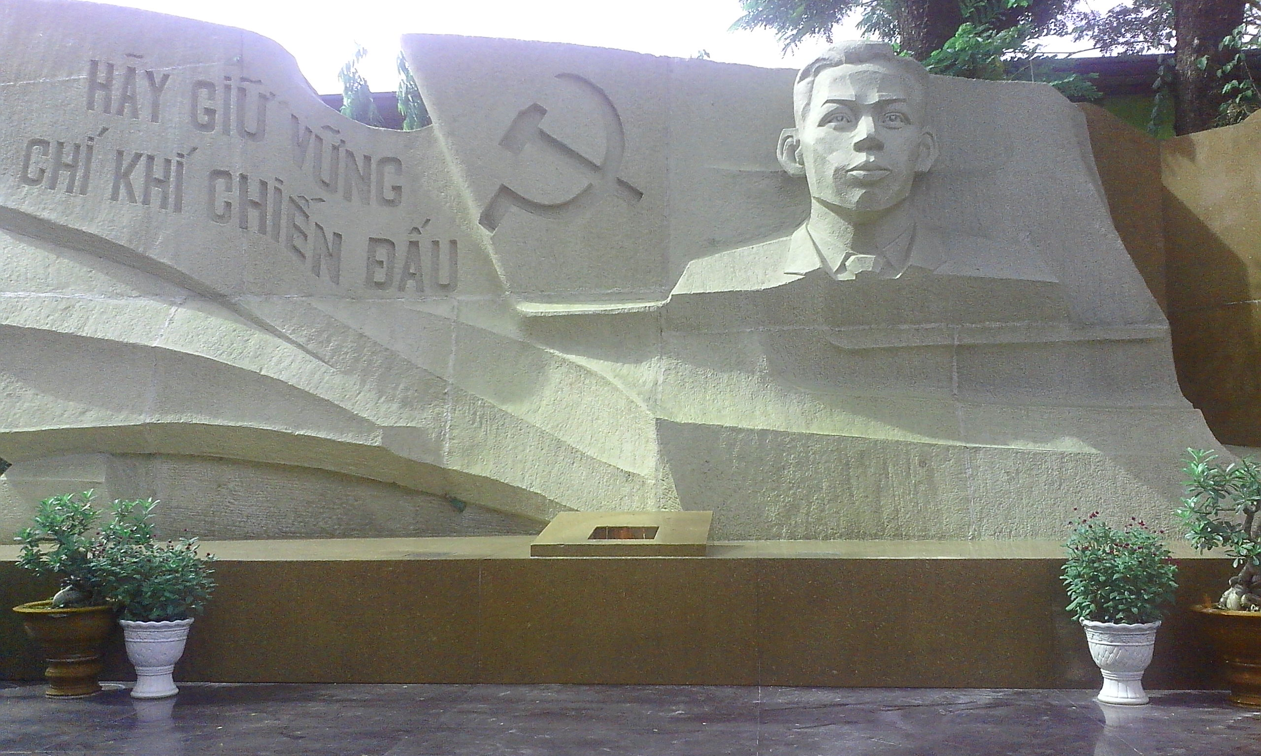 Tượng đài Trần Phú tại công viên Lê Thị Riêng.